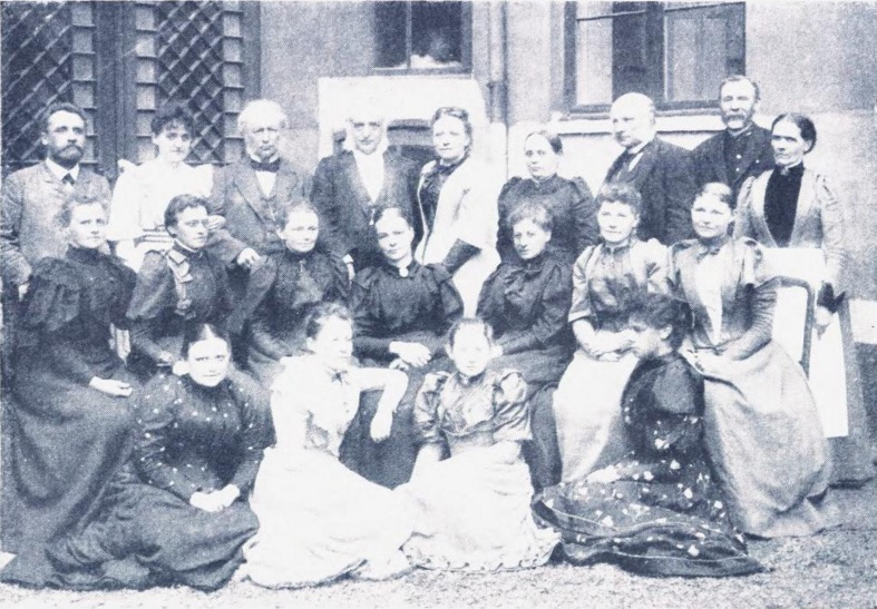 Eldste gruppebilde av personalet ved Nissens Pikeskole (Hartvig Nissens skole), 1893: Øverst fra venstre: Bestyrer/medeier Bernhard Pauss, frk. Sigrid Meidell (gift Suhrke, Johannesburg), Lassen, bestyrer/medeier Einar Lyche, frk. Margr. Grøndahl, frk. Stine Nissen, bestyrer/medeier Johan Carl Keyser, pedell Hans Olsen og hustru Karen. I mellomste rekke: Frk. Fritzner, fru Alla Dahl, frk Gjørstad, fru Pauss, frk Amalie Krogh, frk Lampe (?), frk Scheel. Nederst: Frk. Seeberg, frk Thora Smith, frk Jørgensen, frk. Therese Berteau.